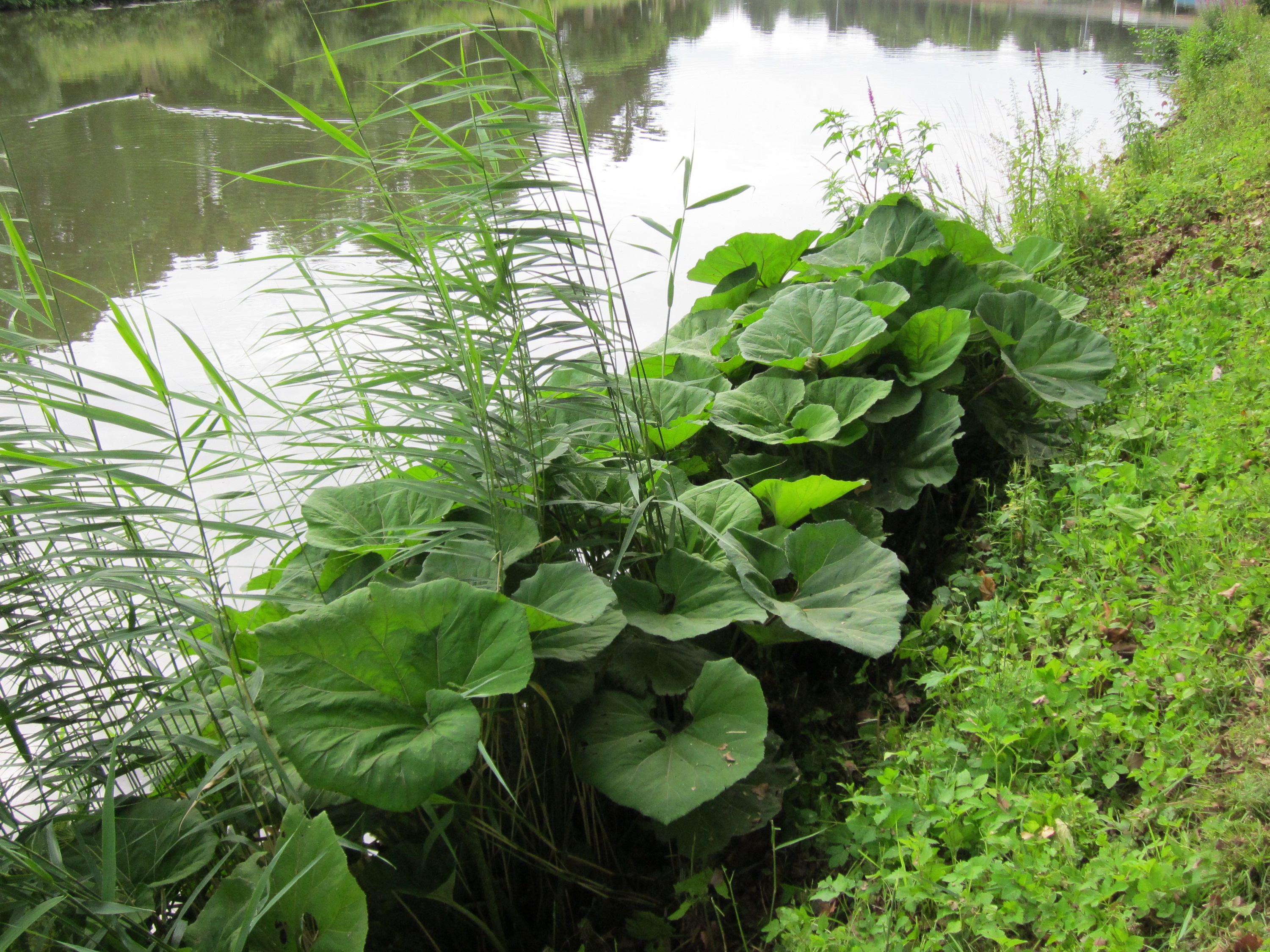 Gewöhnliche Pestwurz (Petasites hybridus) an der Saar in Saarbrücken